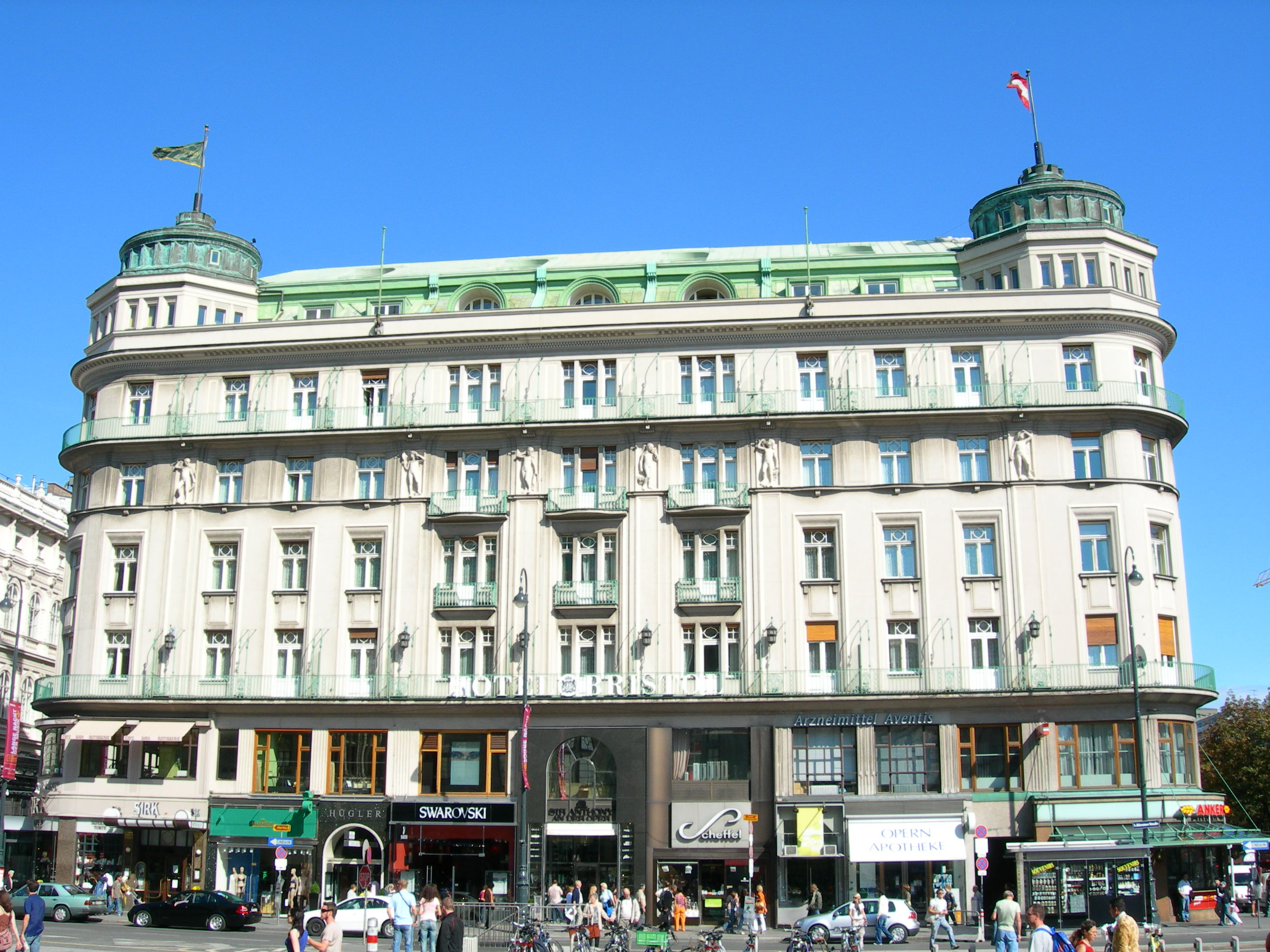 Hotel Bristol in Vienna